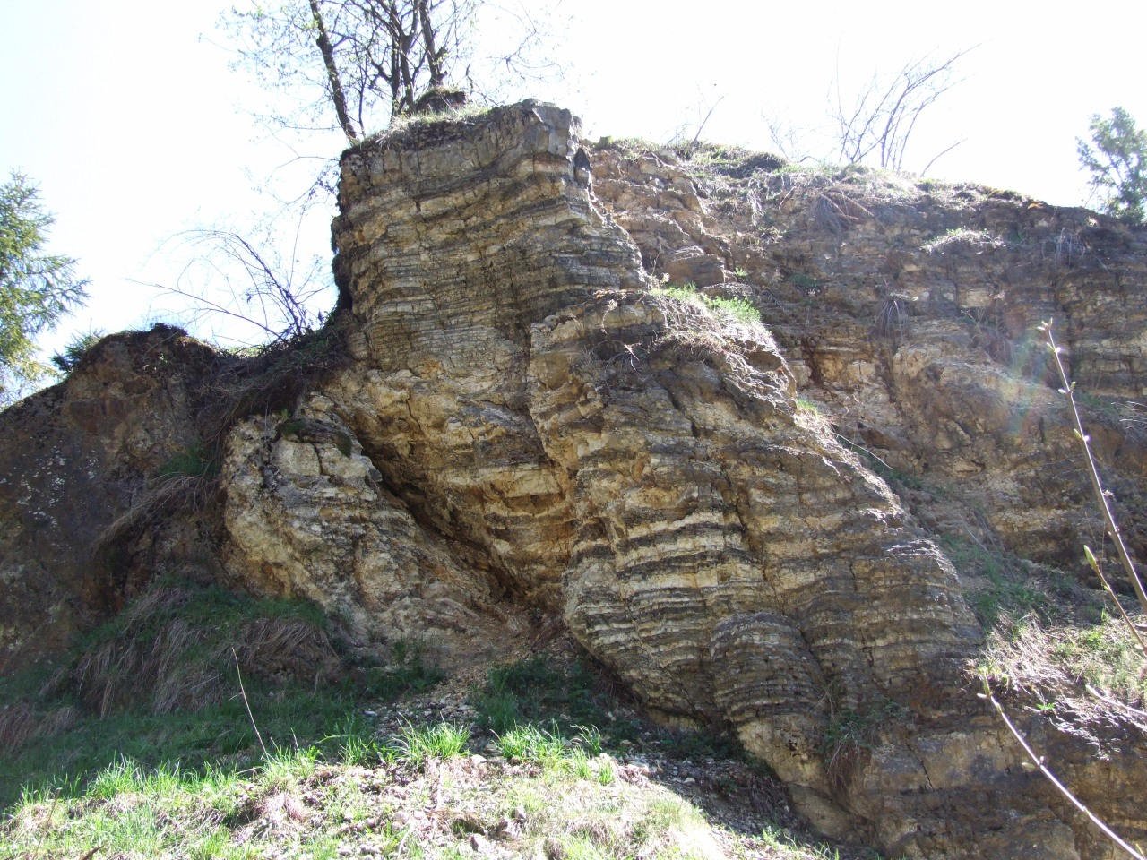 Dawny kamieniołom na górze Wdżar w Gorcach